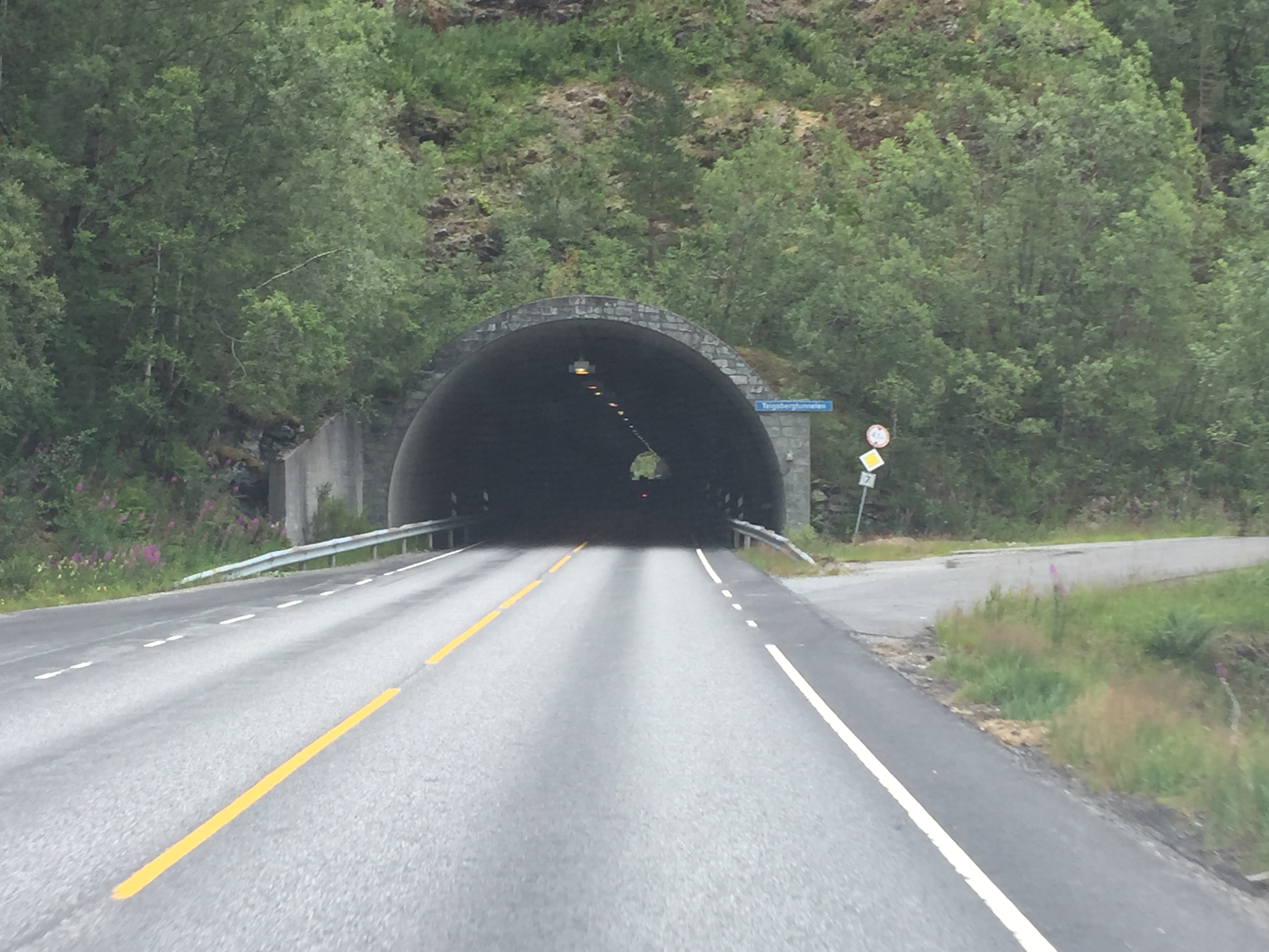 Teigabergtunnelen